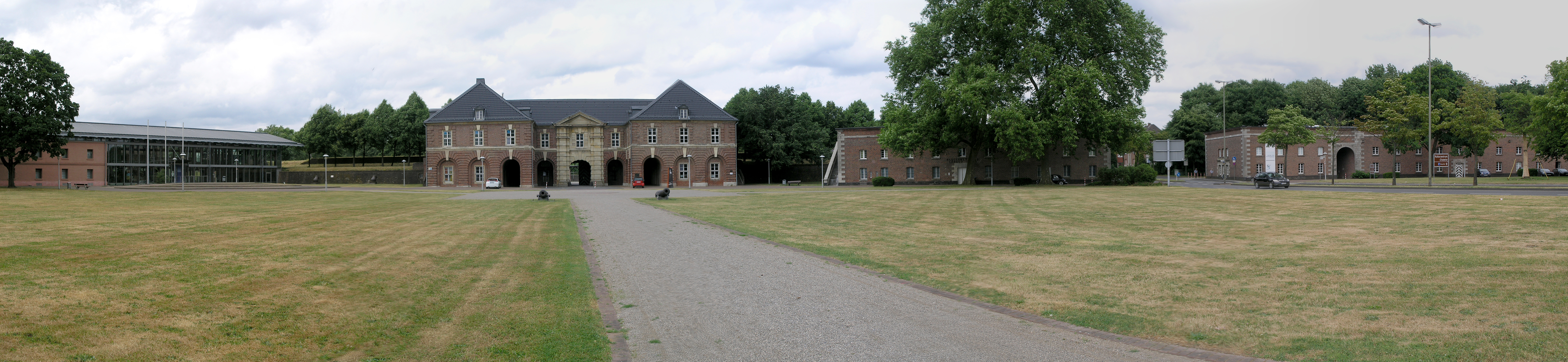 Северный Рейн-Вестфалия, Везель - Берлинские ворота